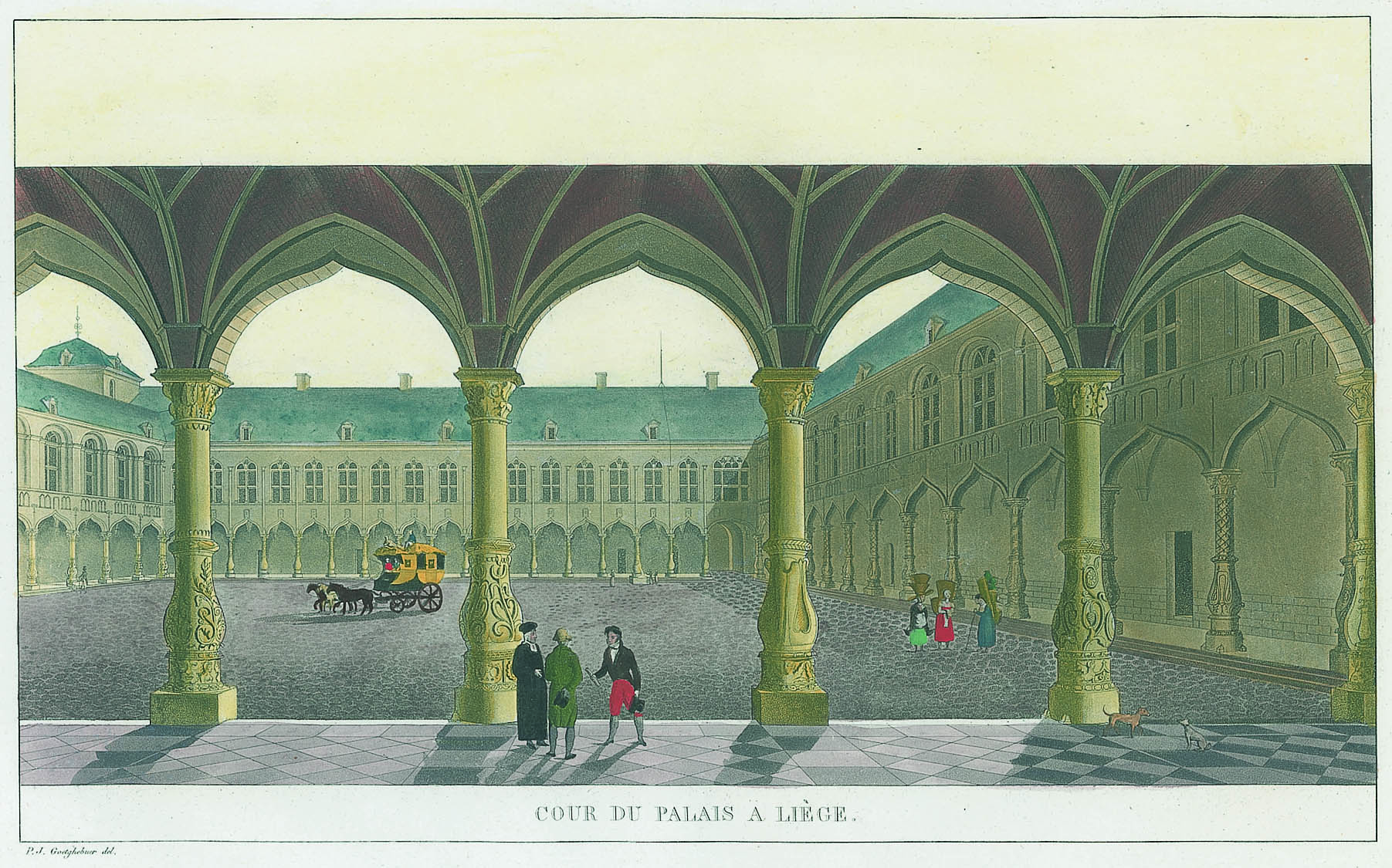 Première cour du palais des Prince-évêques de Liège au XVIIIe siècle